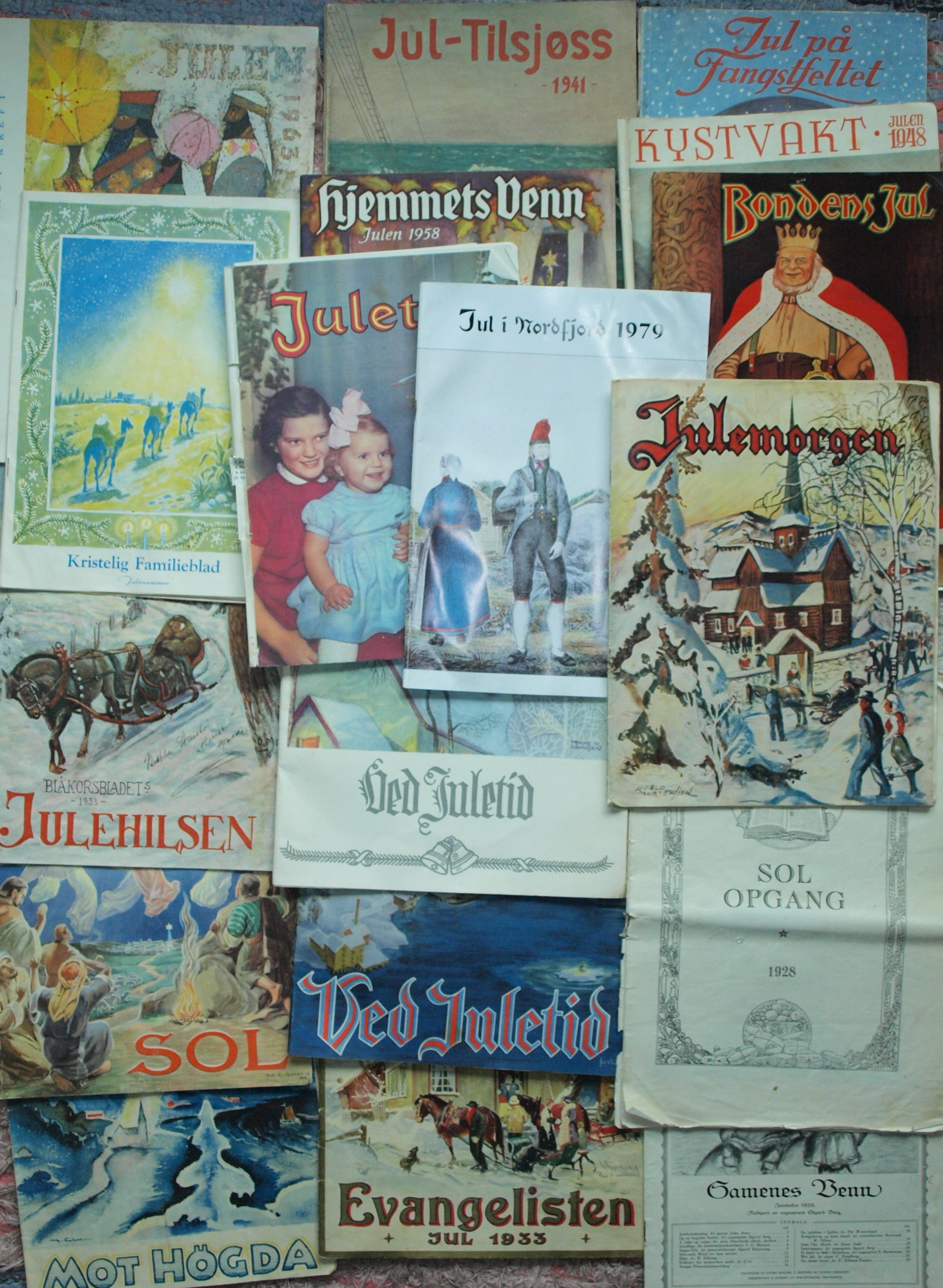 Eit utval eldre julehefte